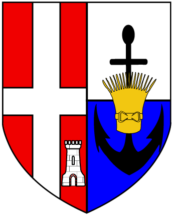 Blason d'Albertville